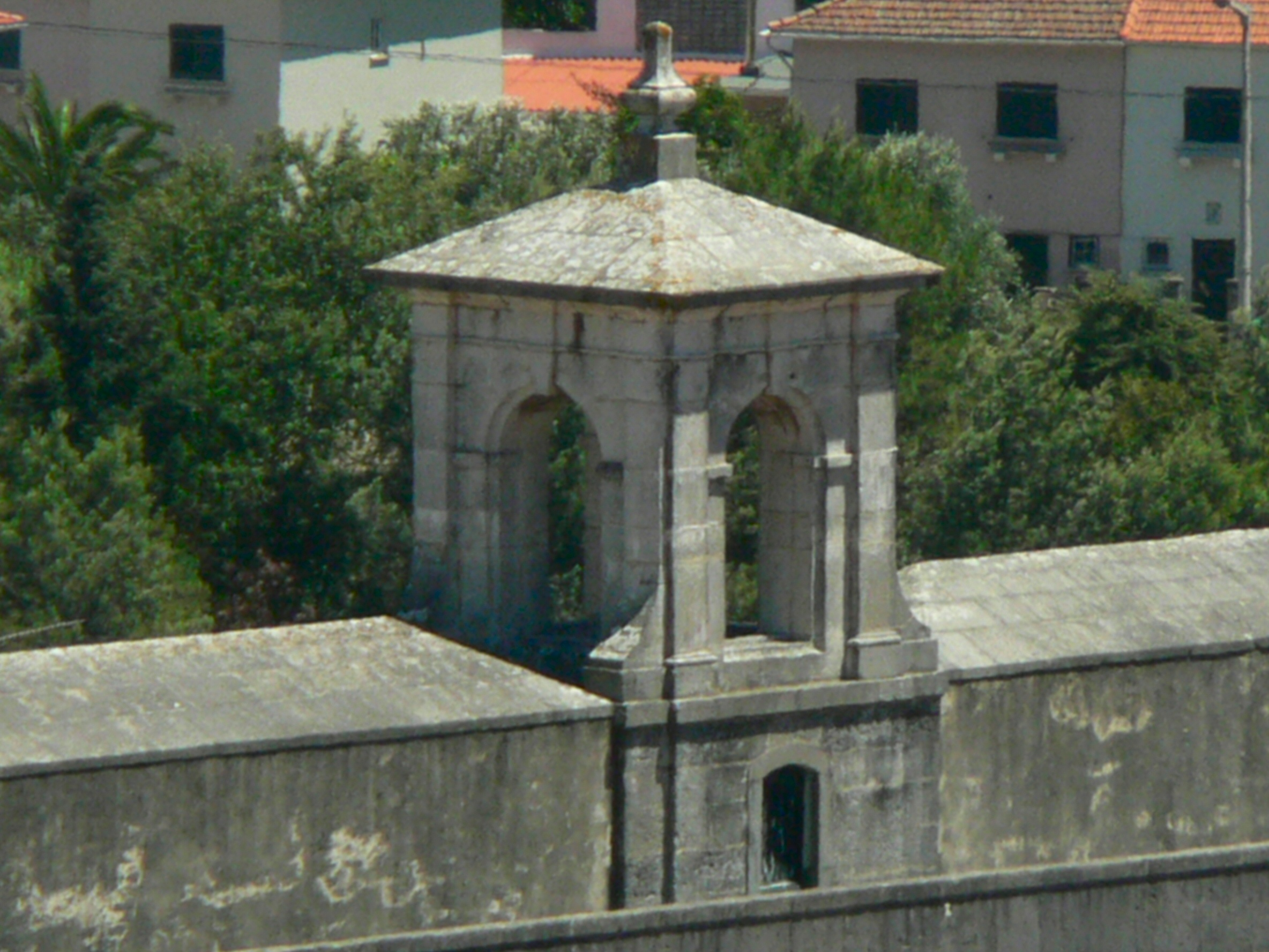 Aqueduto das Águas Livres - pormenor